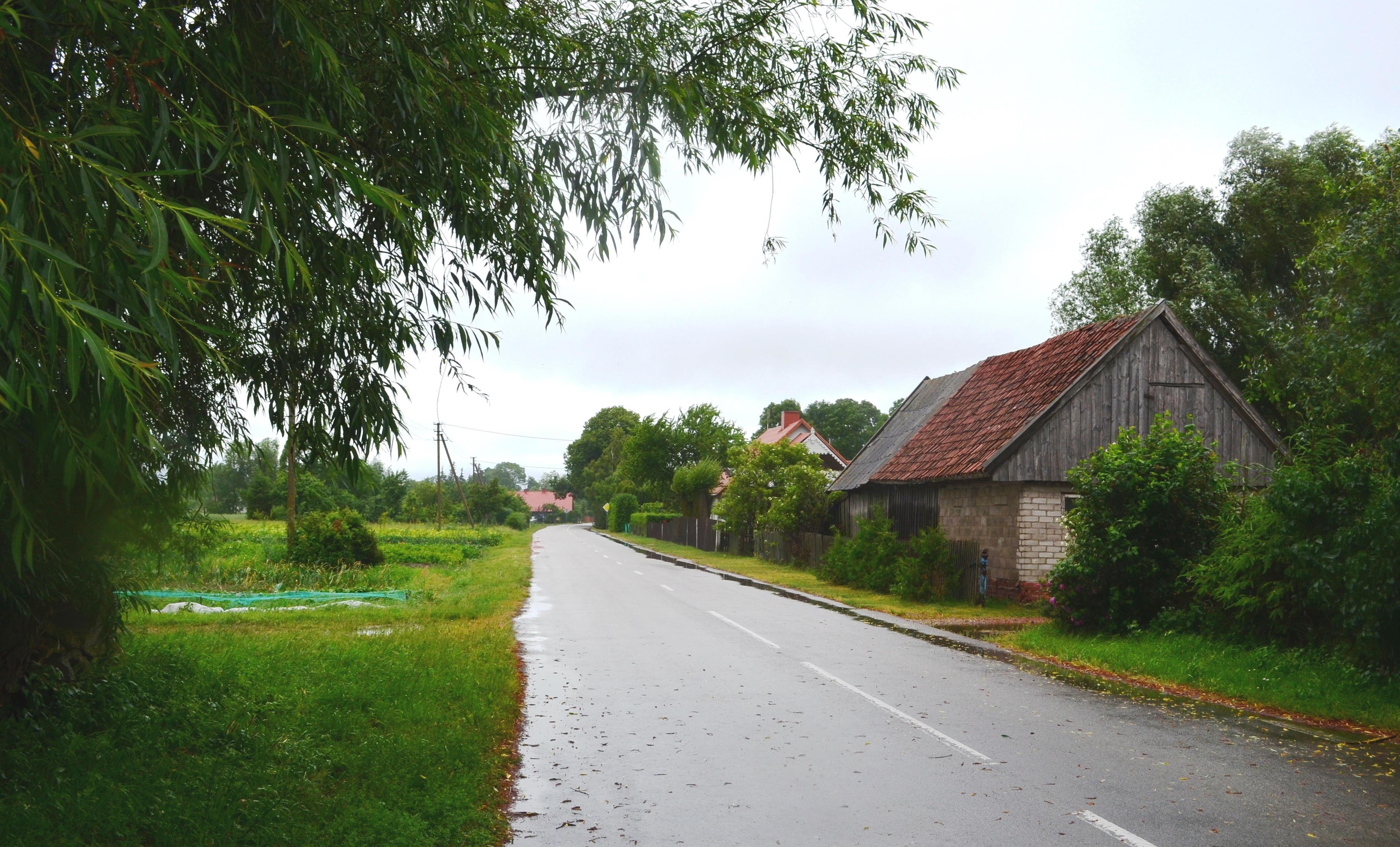 Šyškrantė, Šilutės raj.